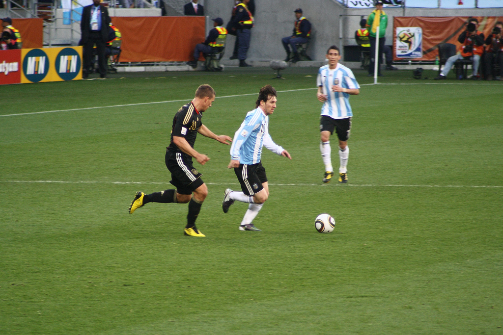 Lionel Messi, Lukas Podolski and Ángel di María